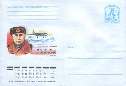 Почтовый конверт Белоруссии - Мазурук Илья Павлович